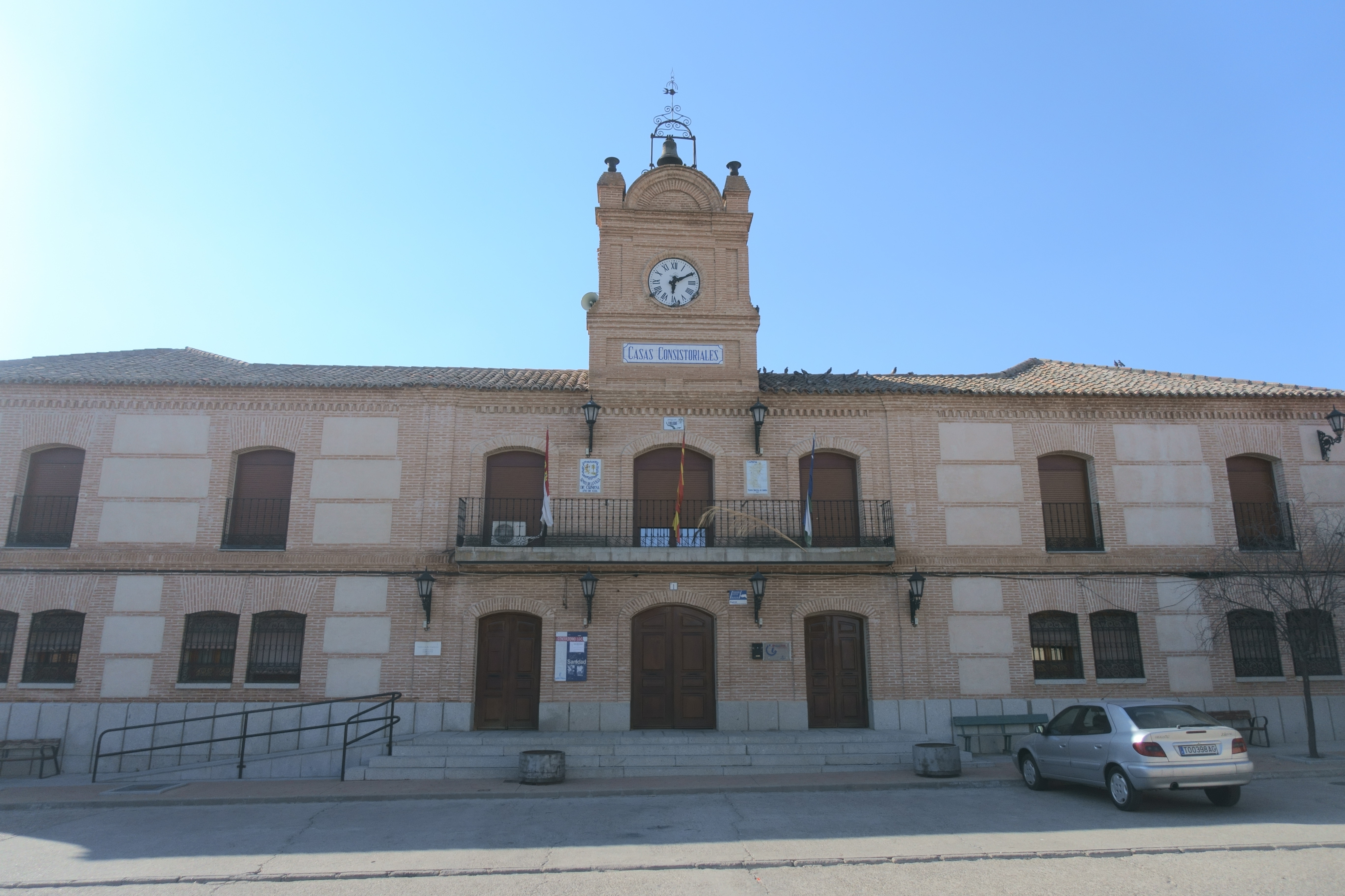 Casa consistorial de Carmena (Toledo, España).